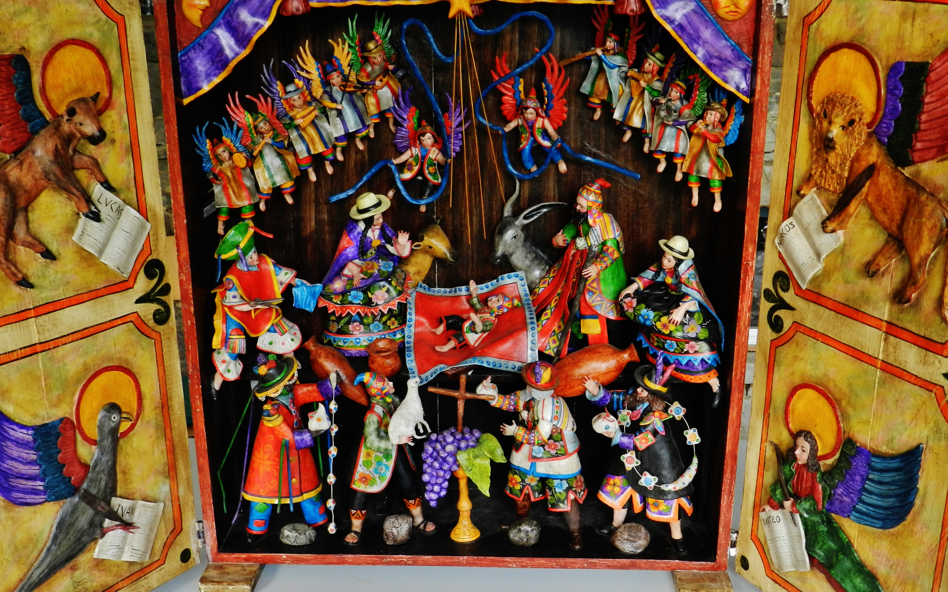 Retablo-Weihnachtskrippe von Maximiano Ochante, Peru, im Oberhessischen Weihnachtskrippen-Museum in Nidda-Ulfa, Hessen, Deutschland